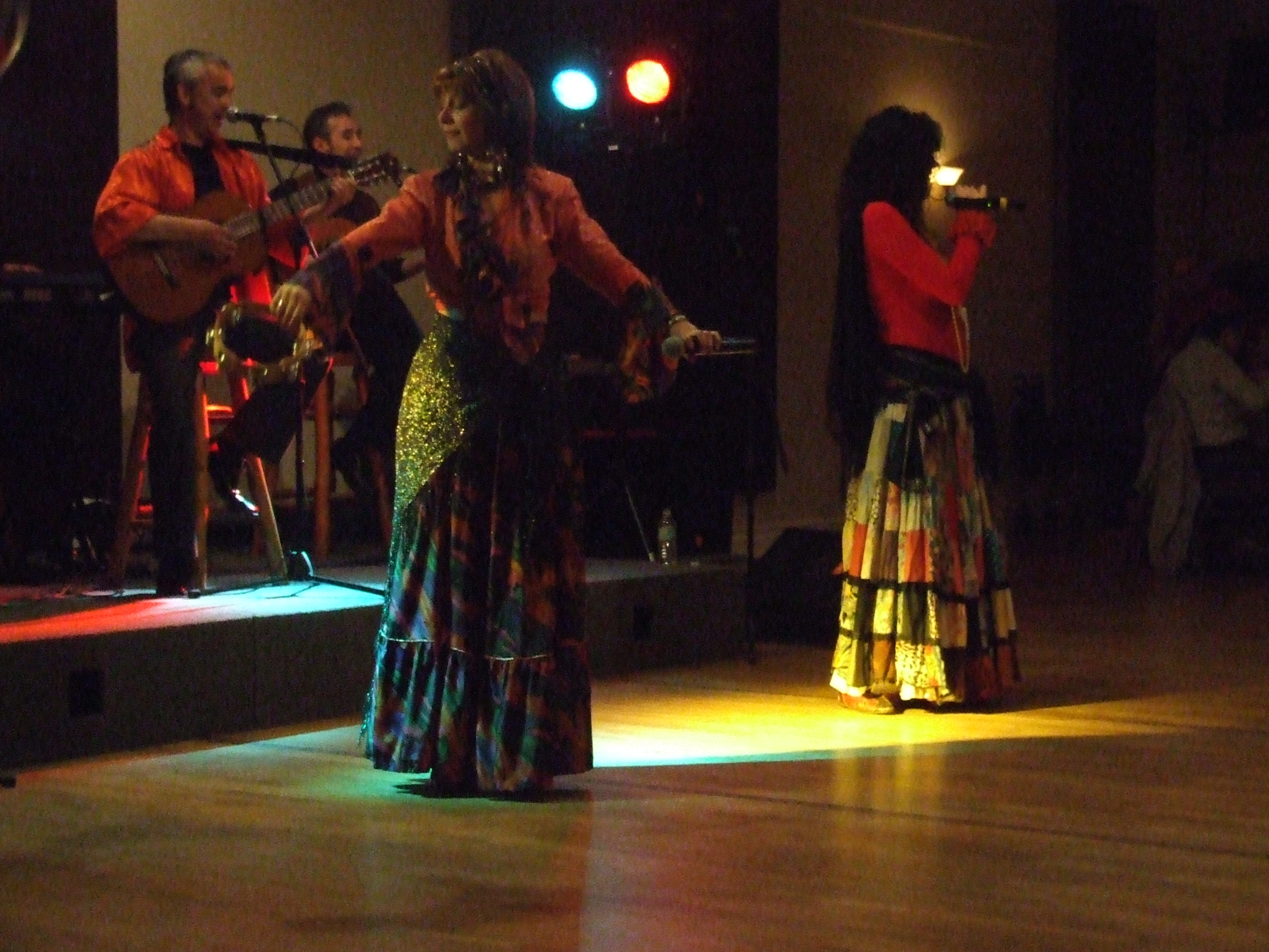 Music band Odjila, Canada, 2008